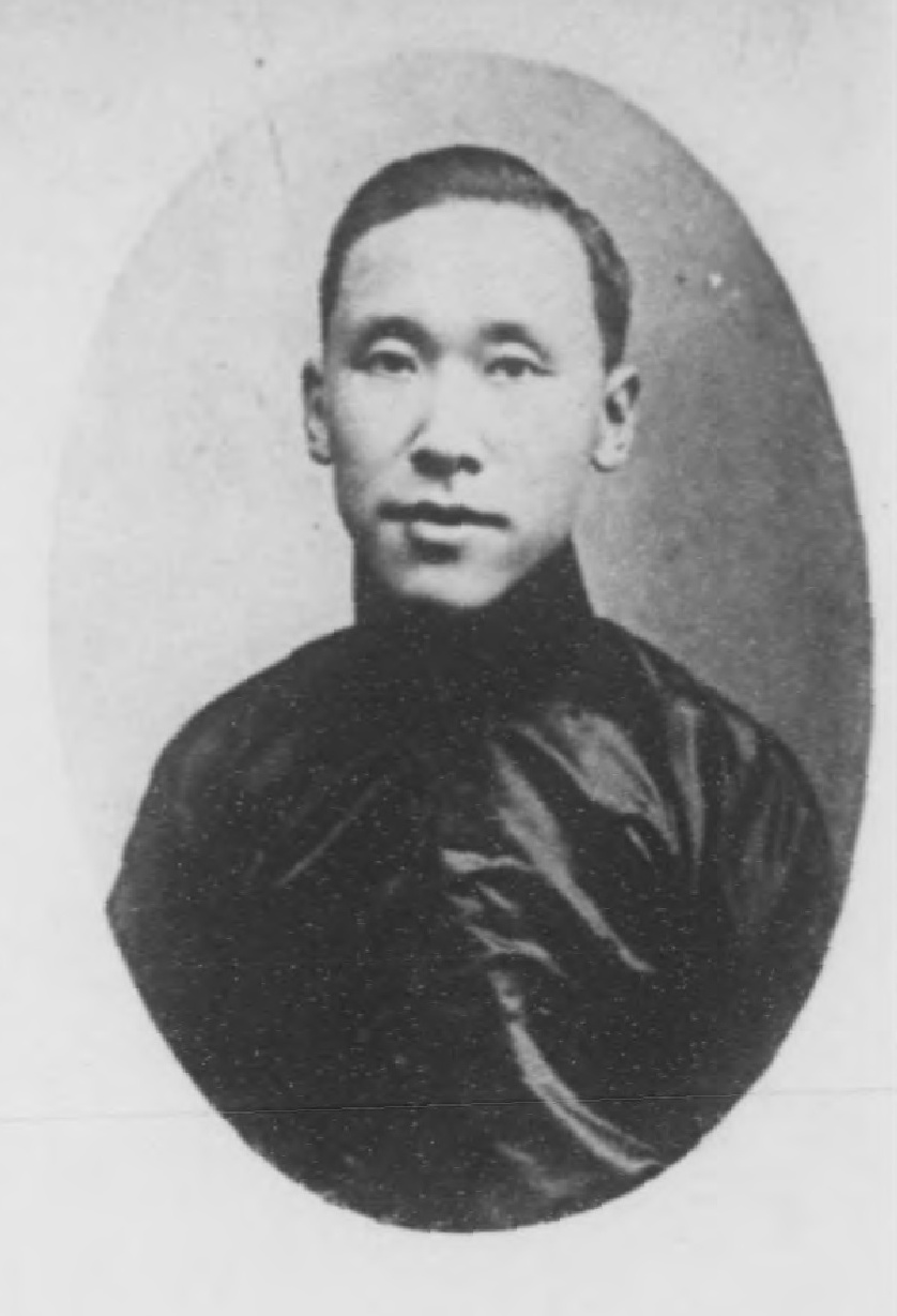 光緒甲辰科進士小像